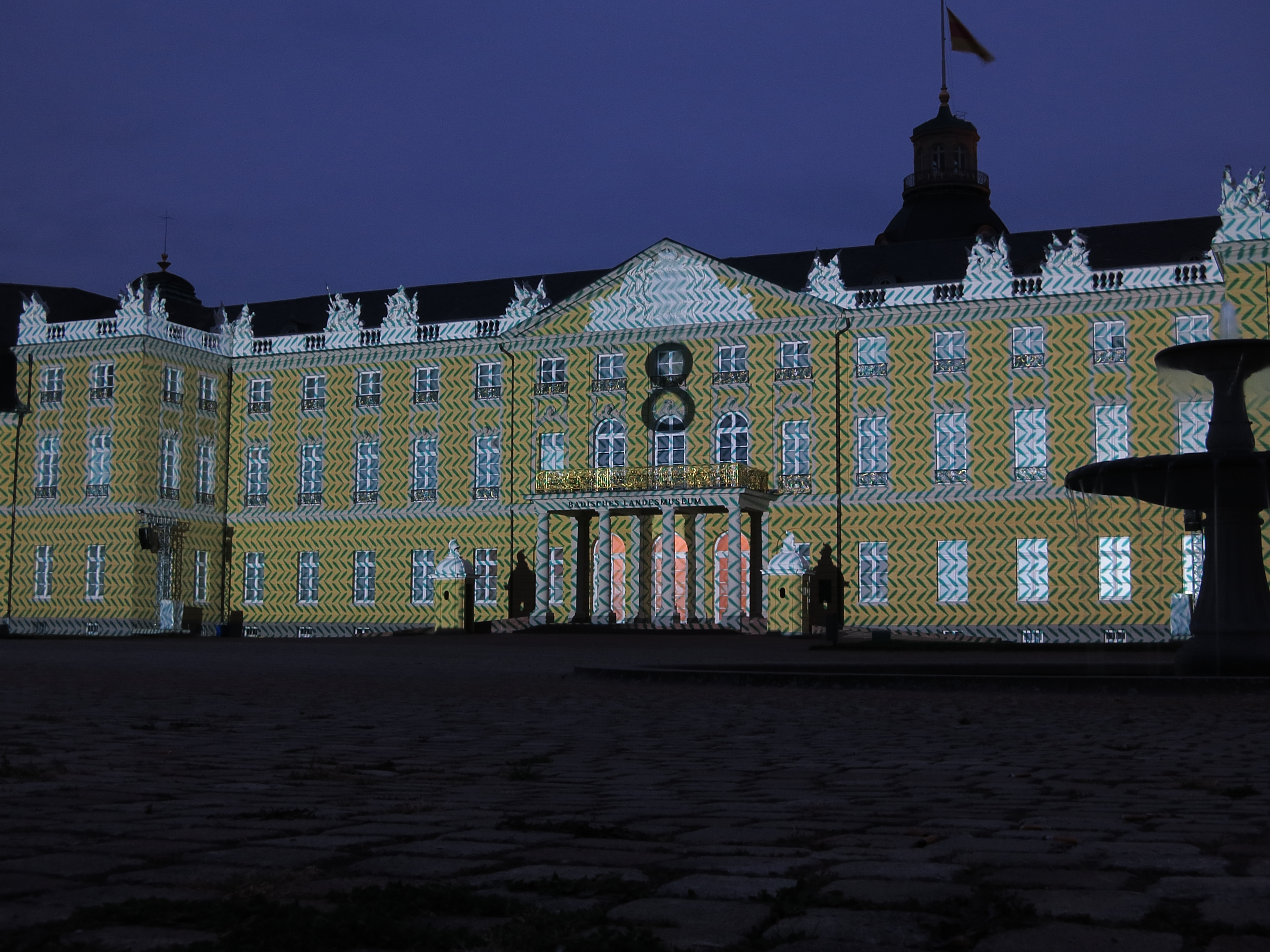 Schlosslichtspiele 2016 in Karlsruhe - kunstvolle Lichtinstallationen werden auf die Fassade des Schlosses projiziert und mit Musik bzw. Geräuschen untermalt. Hier ist eine Aufnahme vom Countdown bis zur nächsten Vorstellung zu sehen, die in 8 Minuten beginnt.